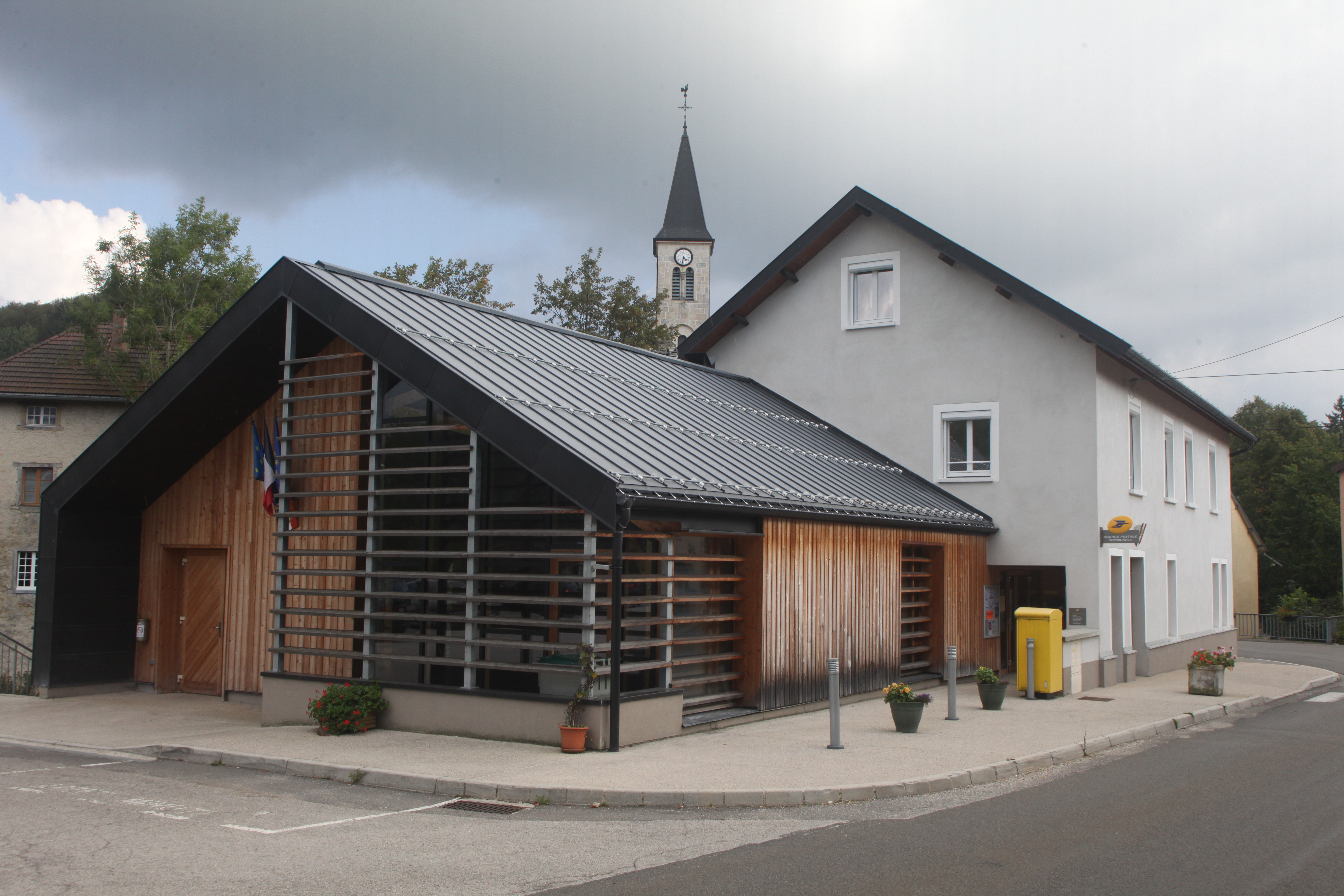 Mairie de Foncine-le-Bas.